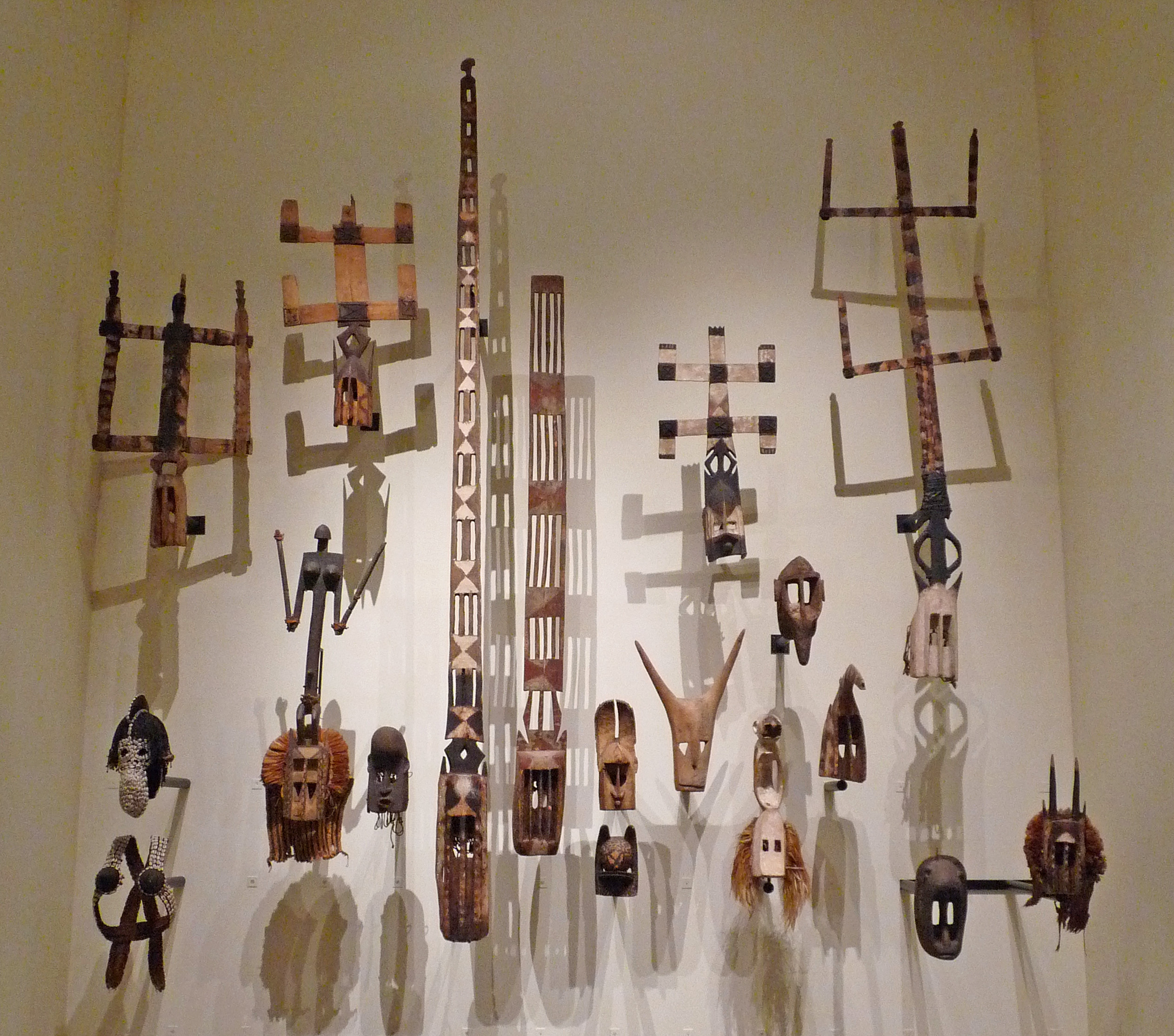 Masques dogon du Mali au Musée du quai Branly. dans la rangée supérieure : masques Kanaga